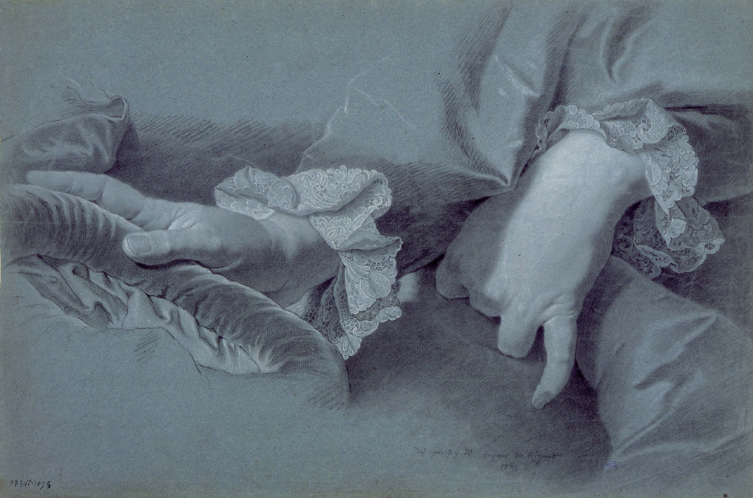 Etudes pour le portrait de Philipp-Ludwig Wenzel von Sinzendorf par Hyacinthe Rigaud (Paris, Petit Palais, Musée des Beaux-Arts de la Ville de Paris)